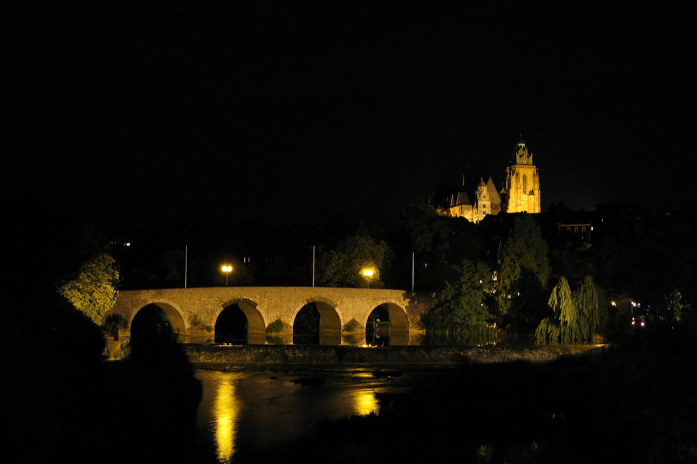 Die Wetzlarer Lahnbrücke und der Dom bei Nacht